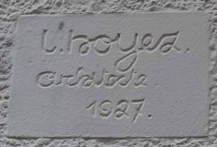 Le Touquet-Paris-Plage - Plaque d'architecte Léon Hoyez située sur la villa Panjo, anciennement villa Le Belvédère ou chalet Sanguet.